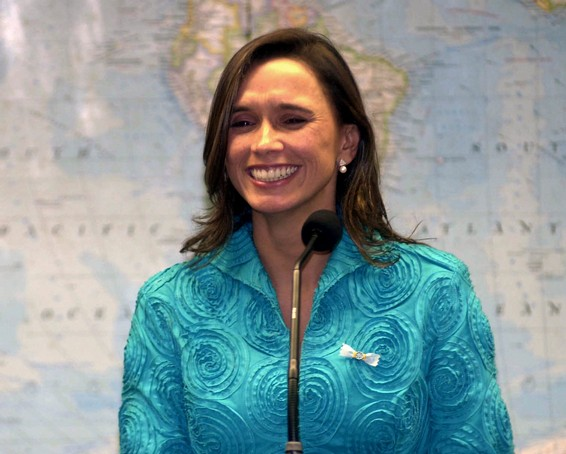 María Consuelo Araujo, ex ministra de relaciones exteriores de Colombia en reunión bilateral con su homologo de Brasil.